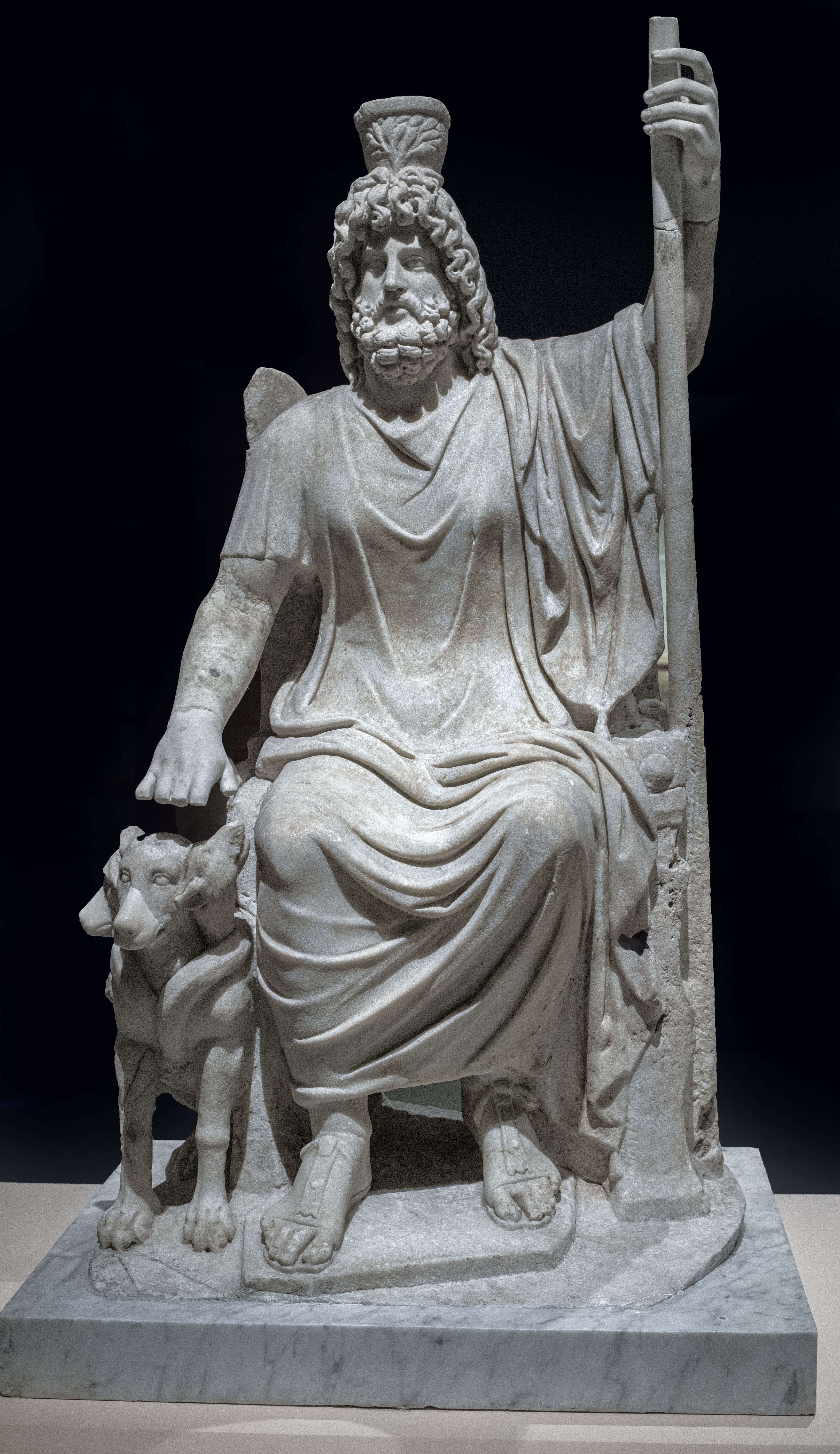 Es una estatua tallada en mármol encontrada en Pozzuoli, sede de la flota romana en el mar Tirreno. Reproduce una estatua de culto del Serapeion de Alejandría. El perro es Cerbero, el guardián de los infiernos. Está datada a finales del siglo II, pertenece al Museo Archeologico en Nápoles y se expuso en Arte Canal, Madrid, en "Cleopatra y la fascinación de Egipto".